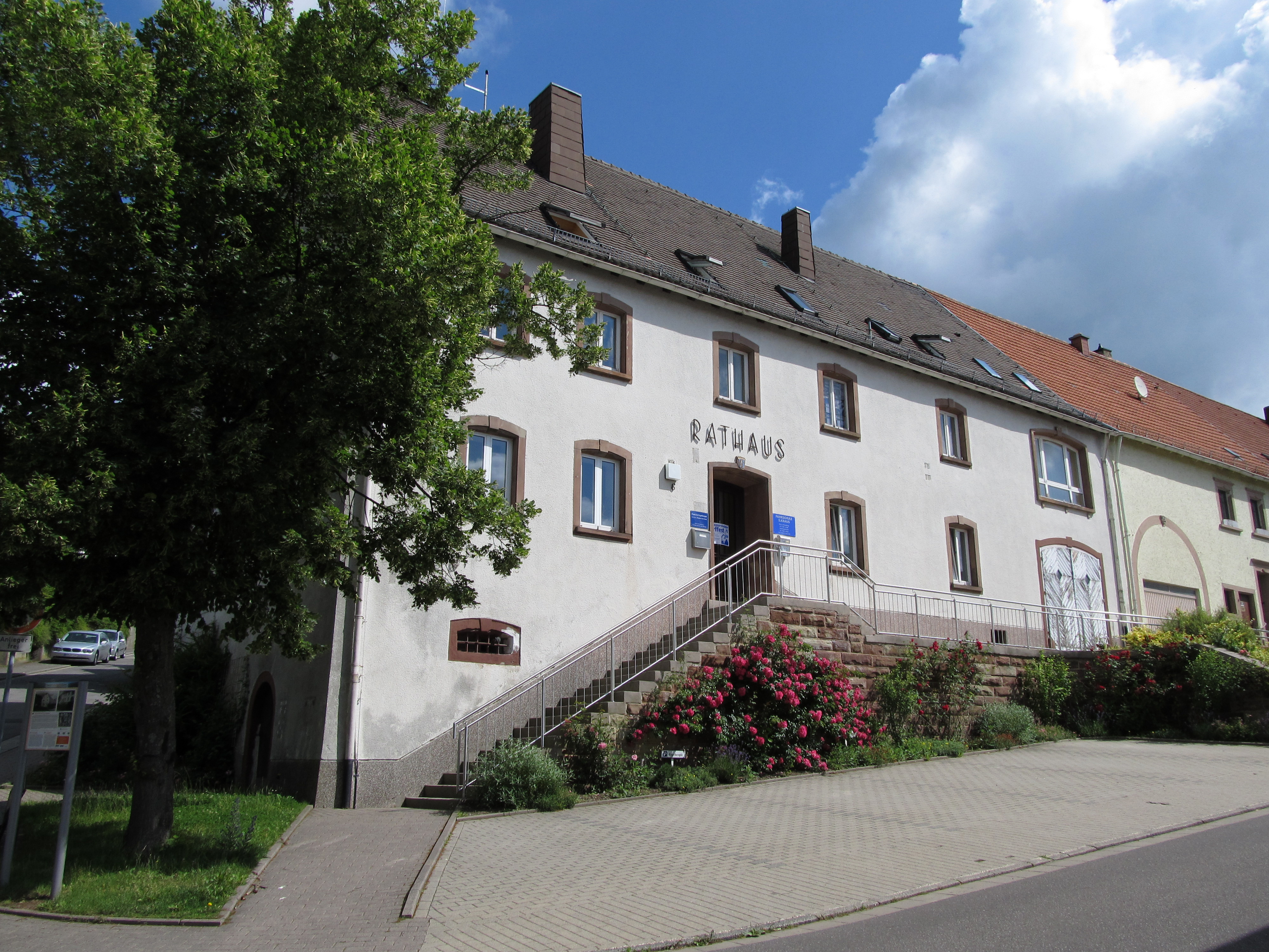 Ehemaliges Rathaus in Ommersheim, Mandelbachtal, Saarland